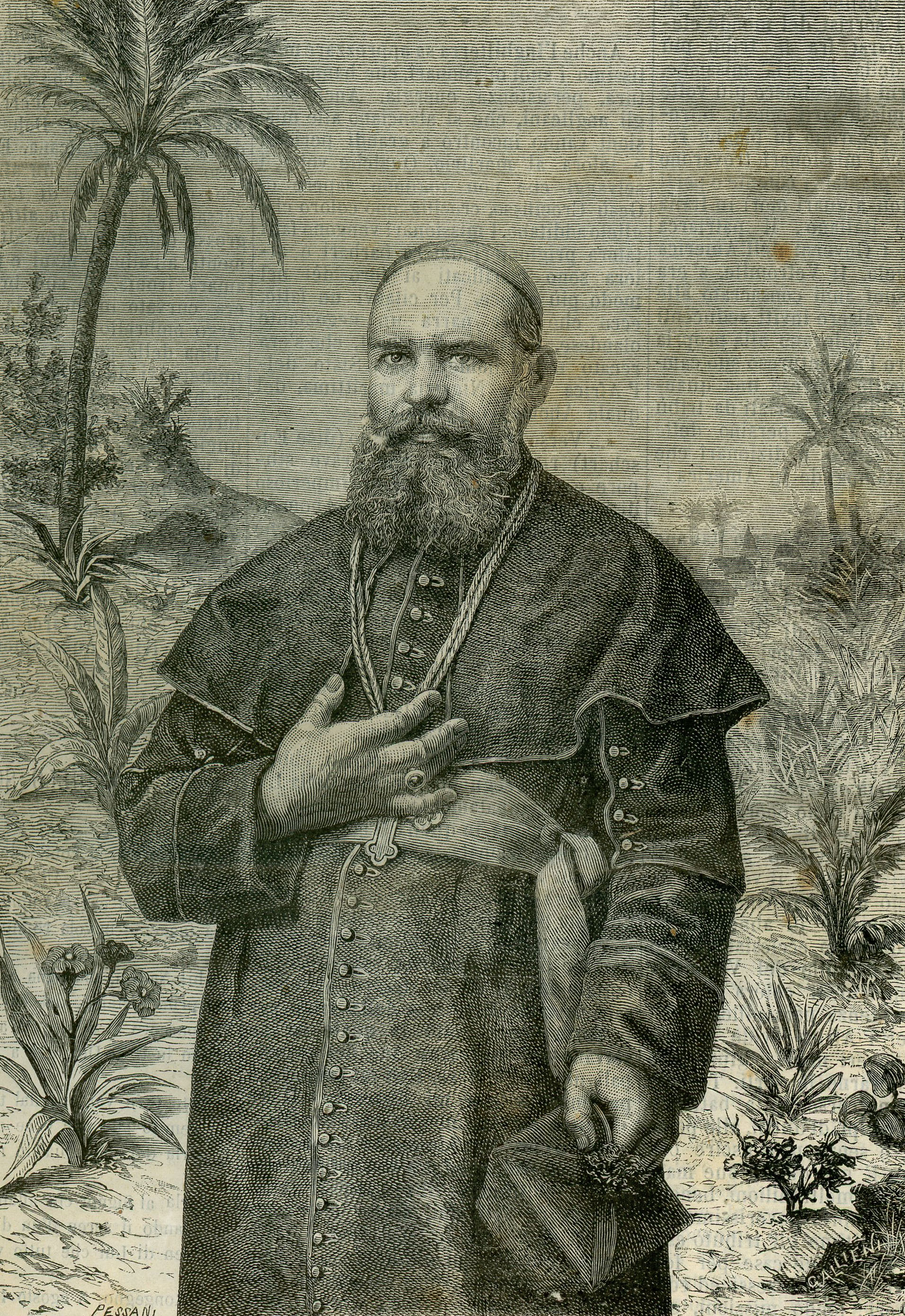 Missionari contemporanei popolari: - Daniele Comboni (xilografia).